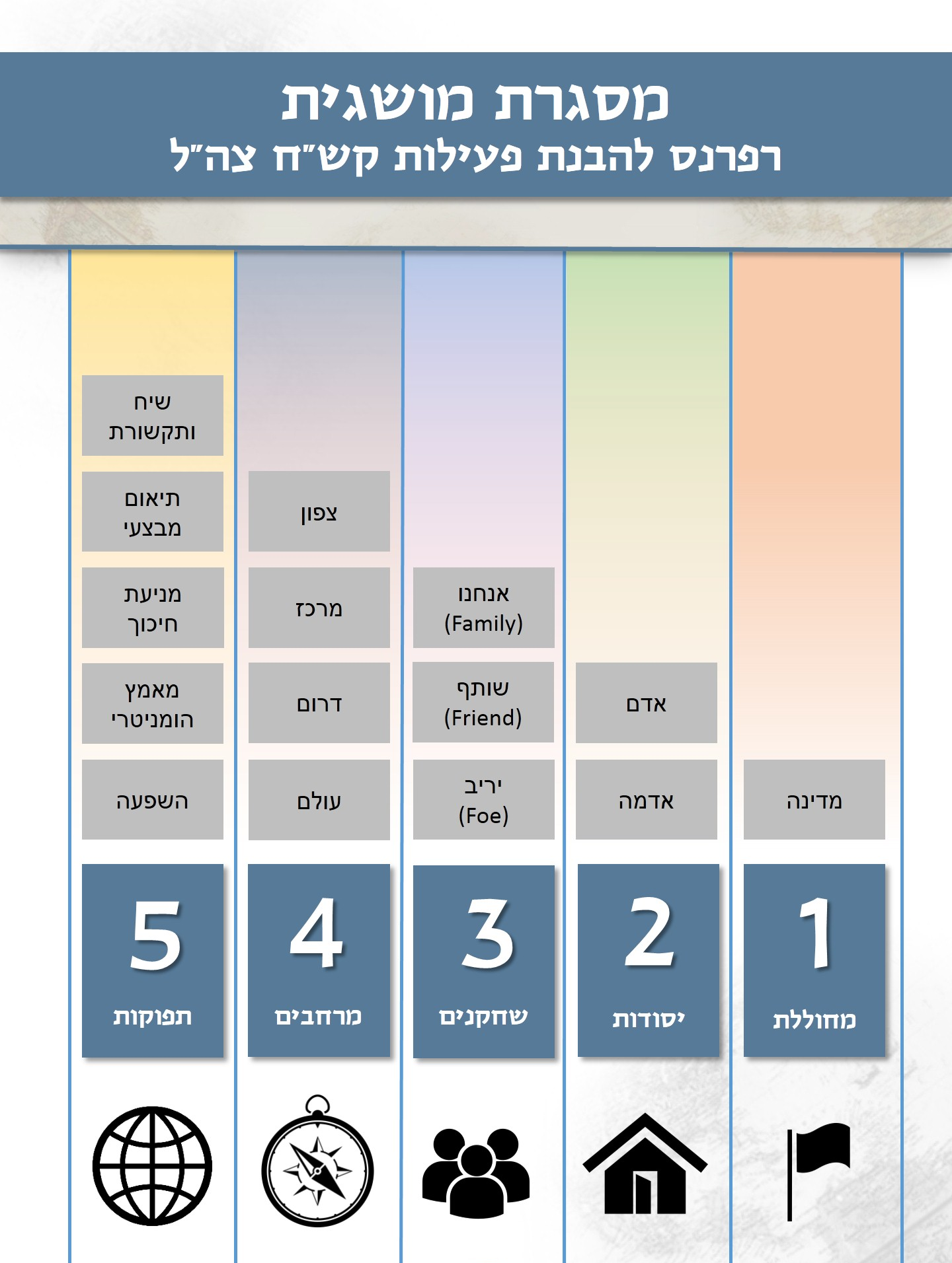 מסגרת מושגית - רעיונית לפעילות קשרי החוץ של צה"ל